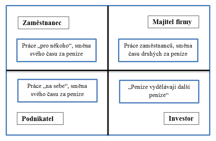 Cashfolw kvadrant - rozdělení lidí do 4 skupin podle způsobu vydělávání peněz.